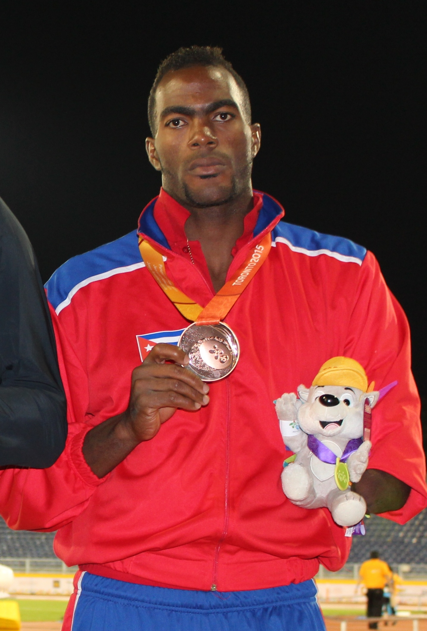 Ettiam Calderón 2015 Parapan American Games